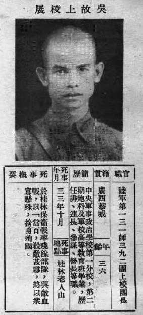 中文（台灣）: 抗戰軍人忠烈錄第一輯中的烈士遺像